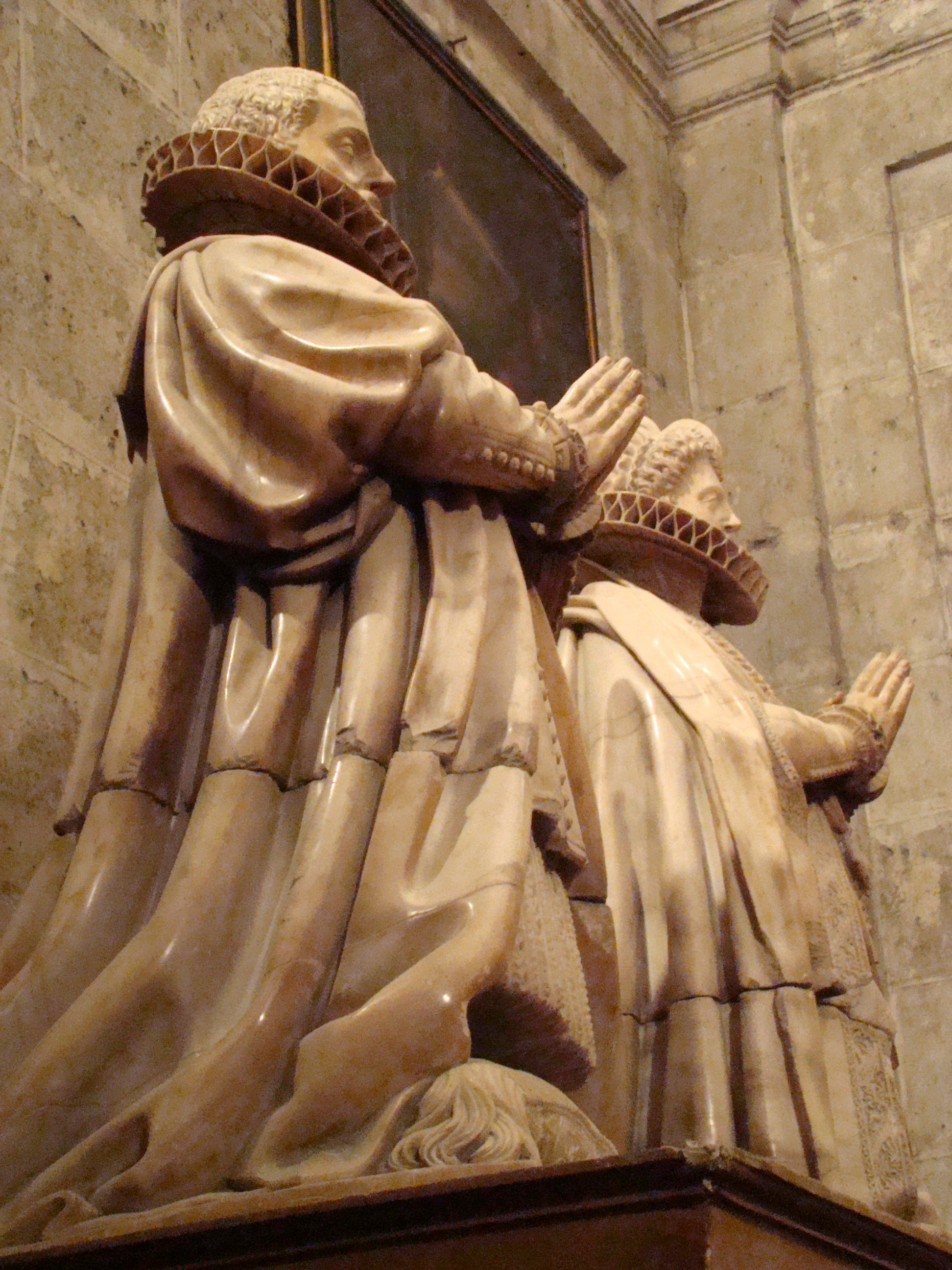 Escultura funeraria de la familia Venero y Leyva, procedente de la capilla de Santa Catalina del desaparecido convento de San Francisco de Valladolid. Seguidor de Pompeyo Leoni. Capilla de San José en la catedral de Valladolid.